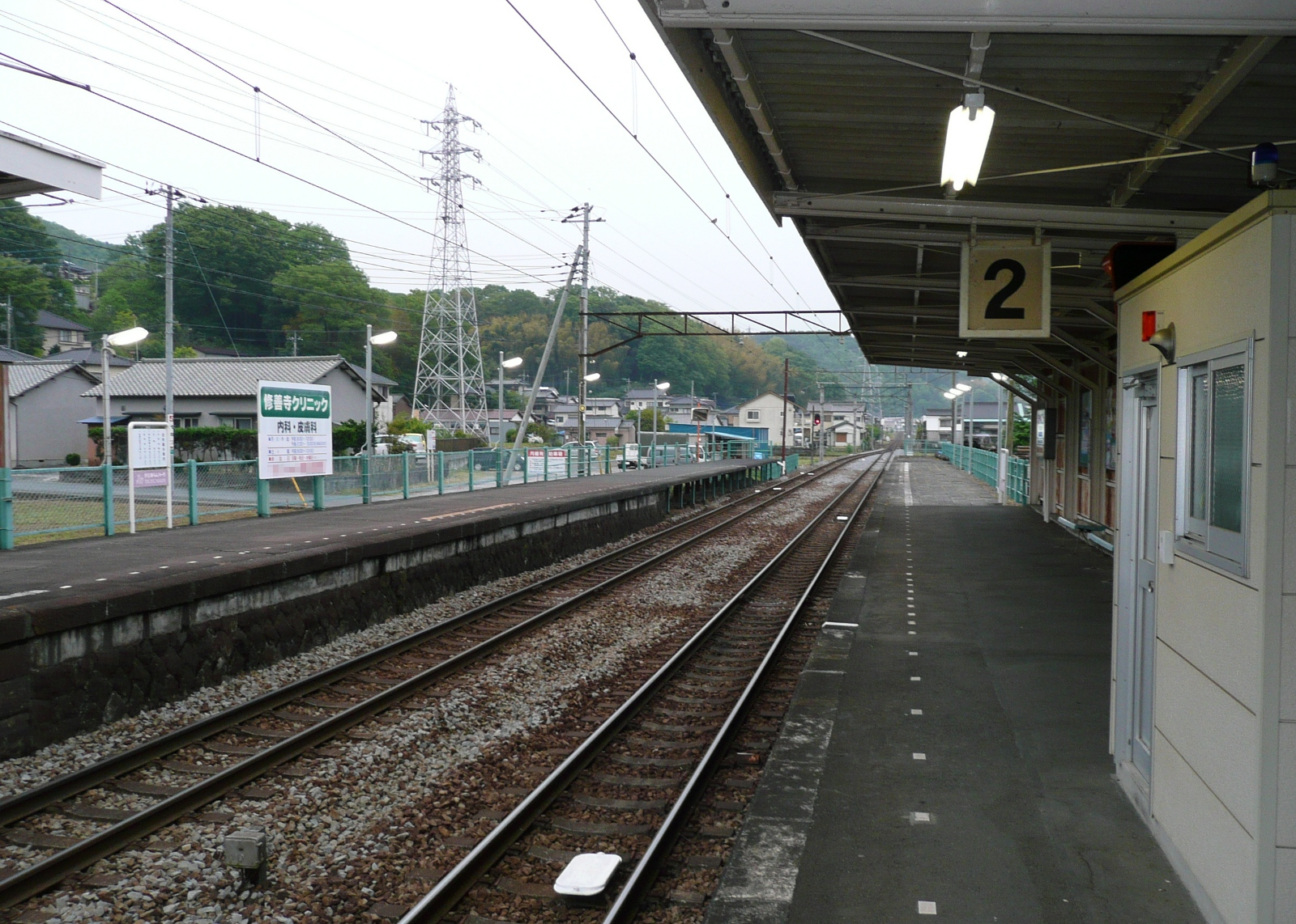 牧之郷駅ホーム